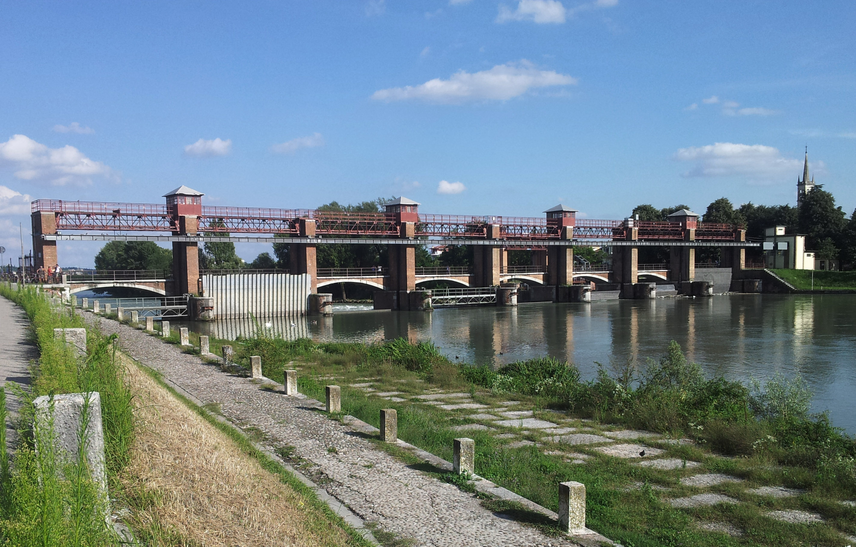 Immagine che ritrae la diga del Chievo dall'argine dell'Adige